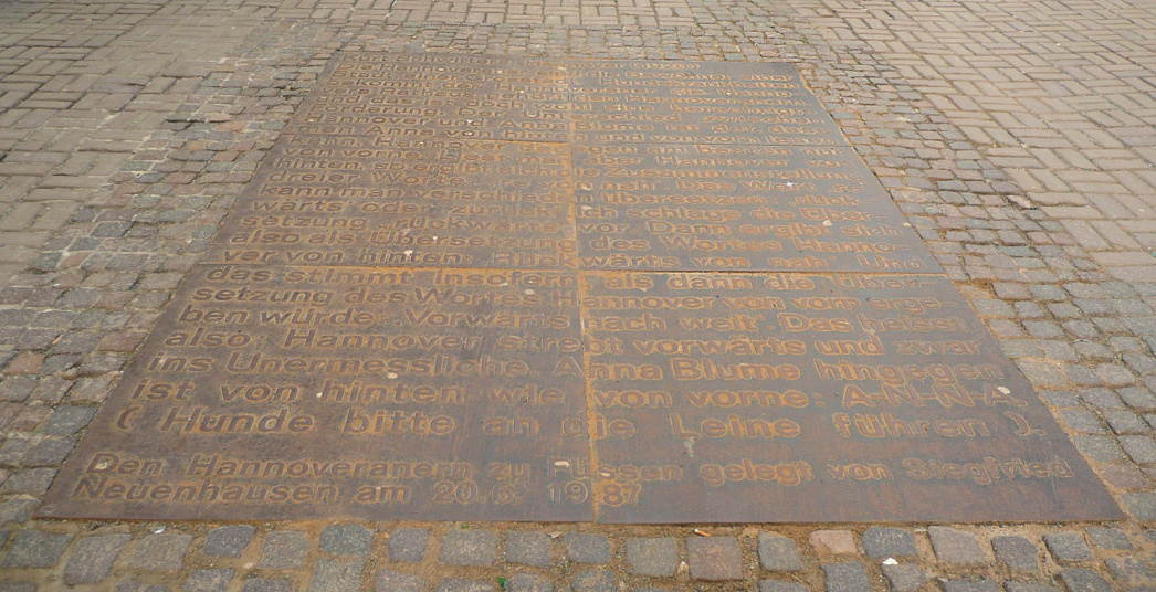 Eisenplatte mit Schwitters Gedicht in Hannover von Siegfried Neuenhausen